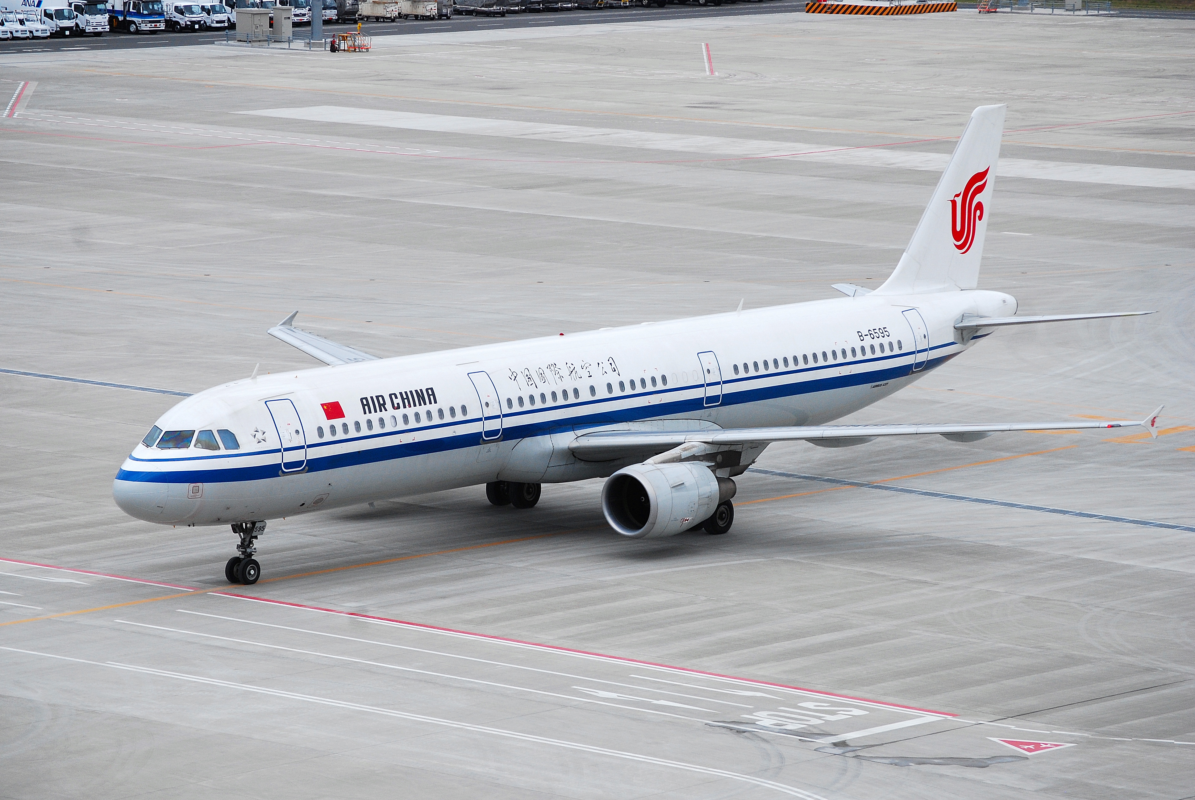 中国国際航空、エアバスA321-200（羽田空港国際線ターミナル展望デッキから撮影）